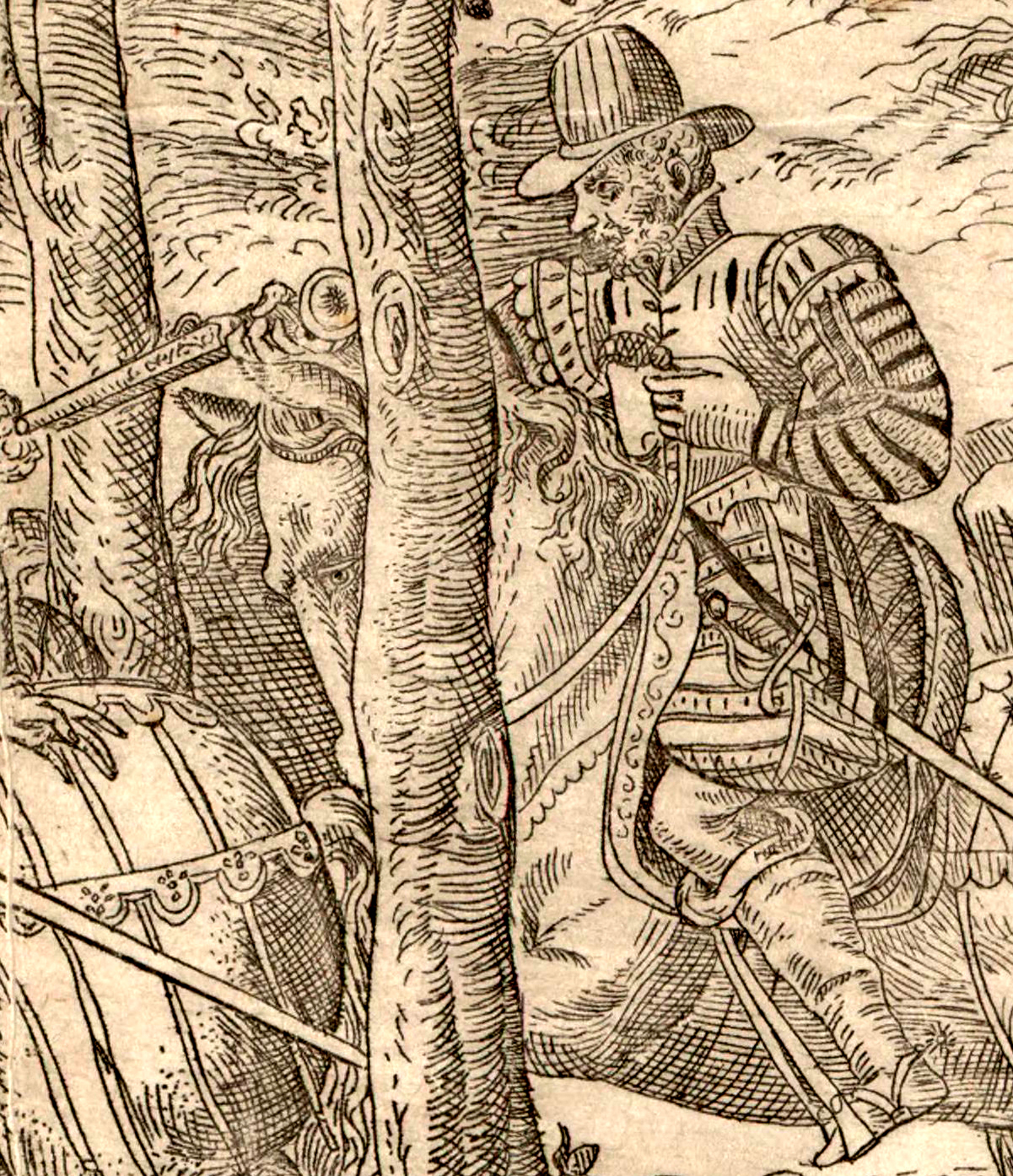 Jean de Poltrot de Méré assassinant le duc François de Guise, 18 février 1563. Détail d'une gravure réalisée par Tortorel et Perrissin, vers 1570.